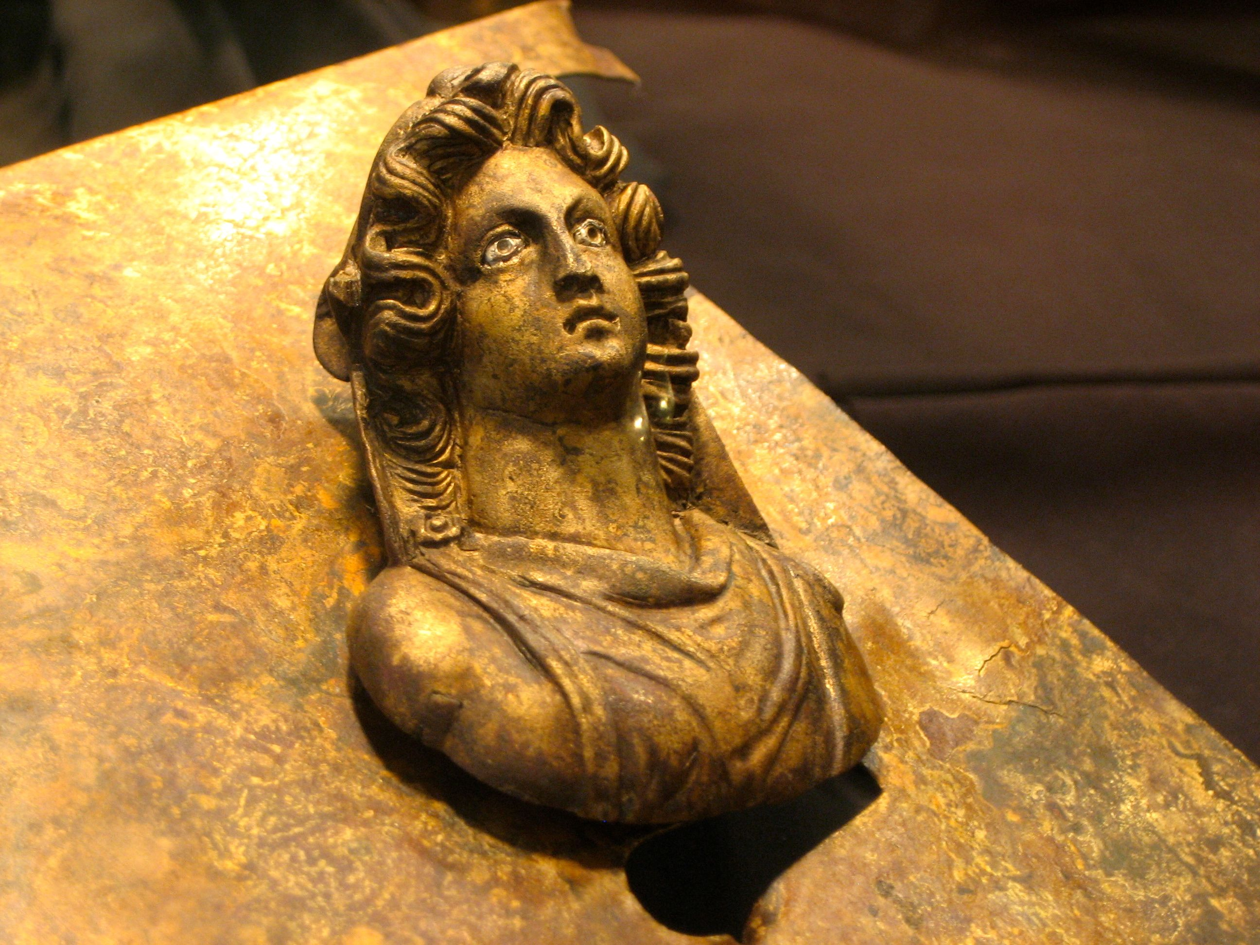 Pièce découverte dans un puits gallo-romain à Châteaumeillant en 2012